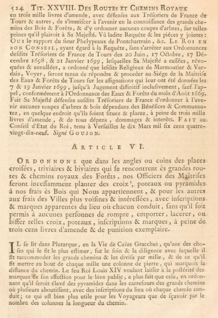 Conférence de l'ordonnance de Louis XIV du mois d'août 1669, sur le fait des eaux et forêts. Tome 2 / , avec les édits, déclarations, coutumes... depuis l'an 1115 jusqu'à présent. Contenant les loix forestières de France. Nouvelle édition, augmentée des observations de M. Simon,... & M. Segauld,... Article 6 du Titre. XXVIII. « Des Routes et Chemins Royaux ès Forêts et Marchepieds »